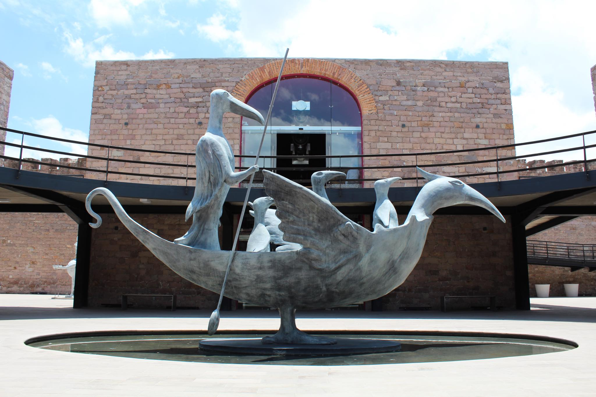 La Barca de las Grullas en el Museo Leonora Carrington San Luis Potosí